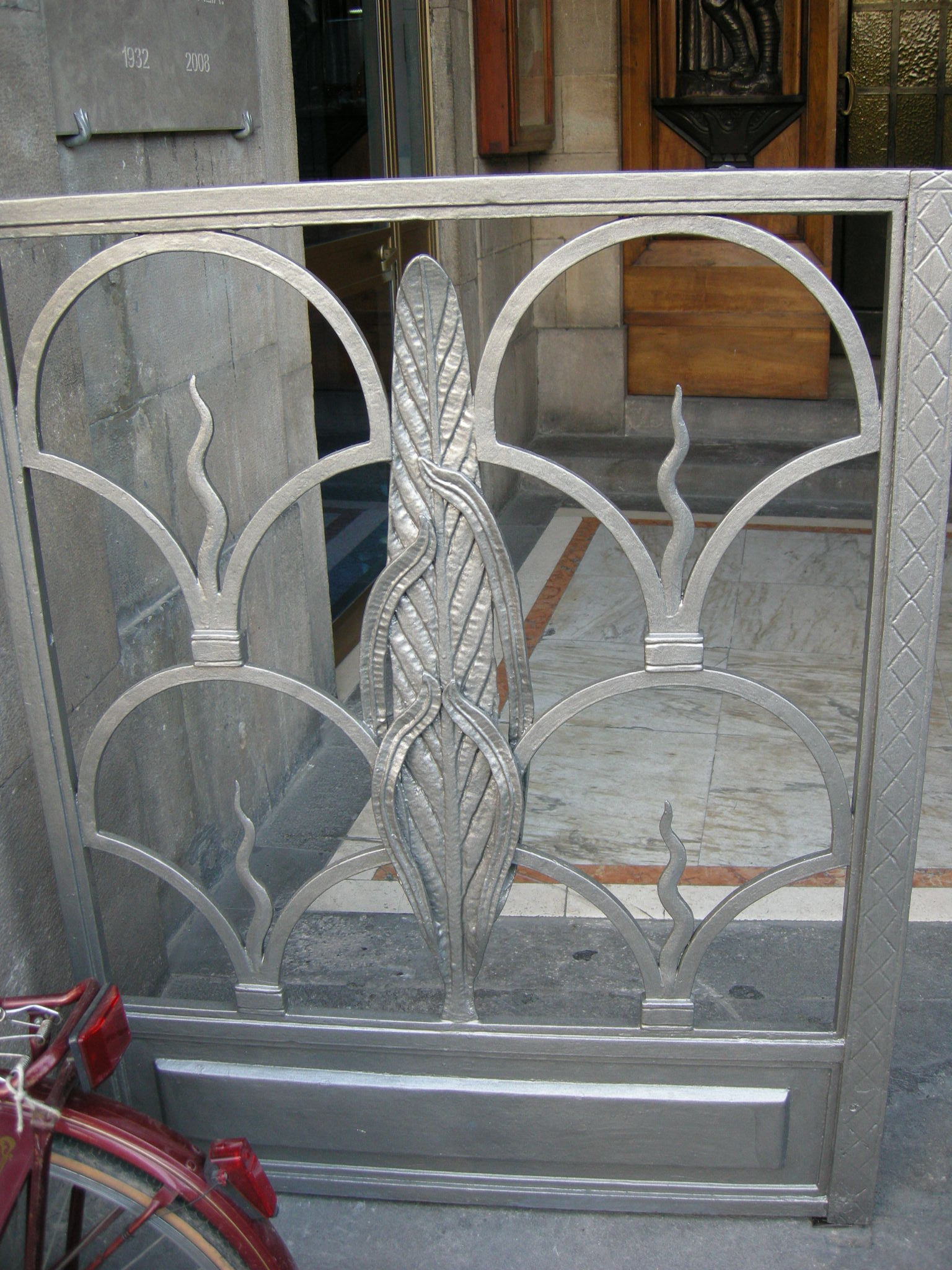 Casa del Mutilato (Lucca) 03 cancellata